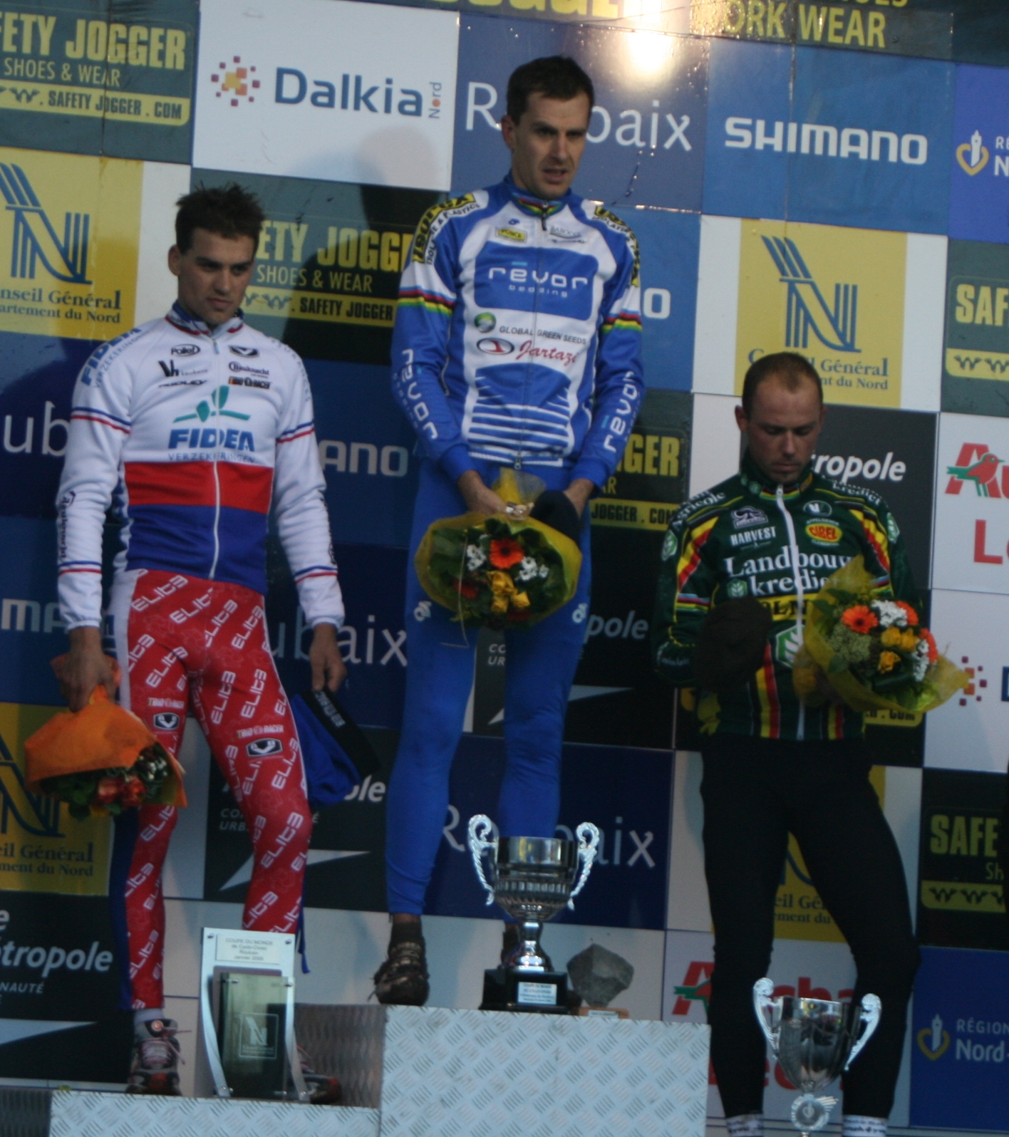 Podium du cyclo-cross de Roubaix 2009 (Zdenek Stybar, Erwin Vervecken, Sven Nijs)